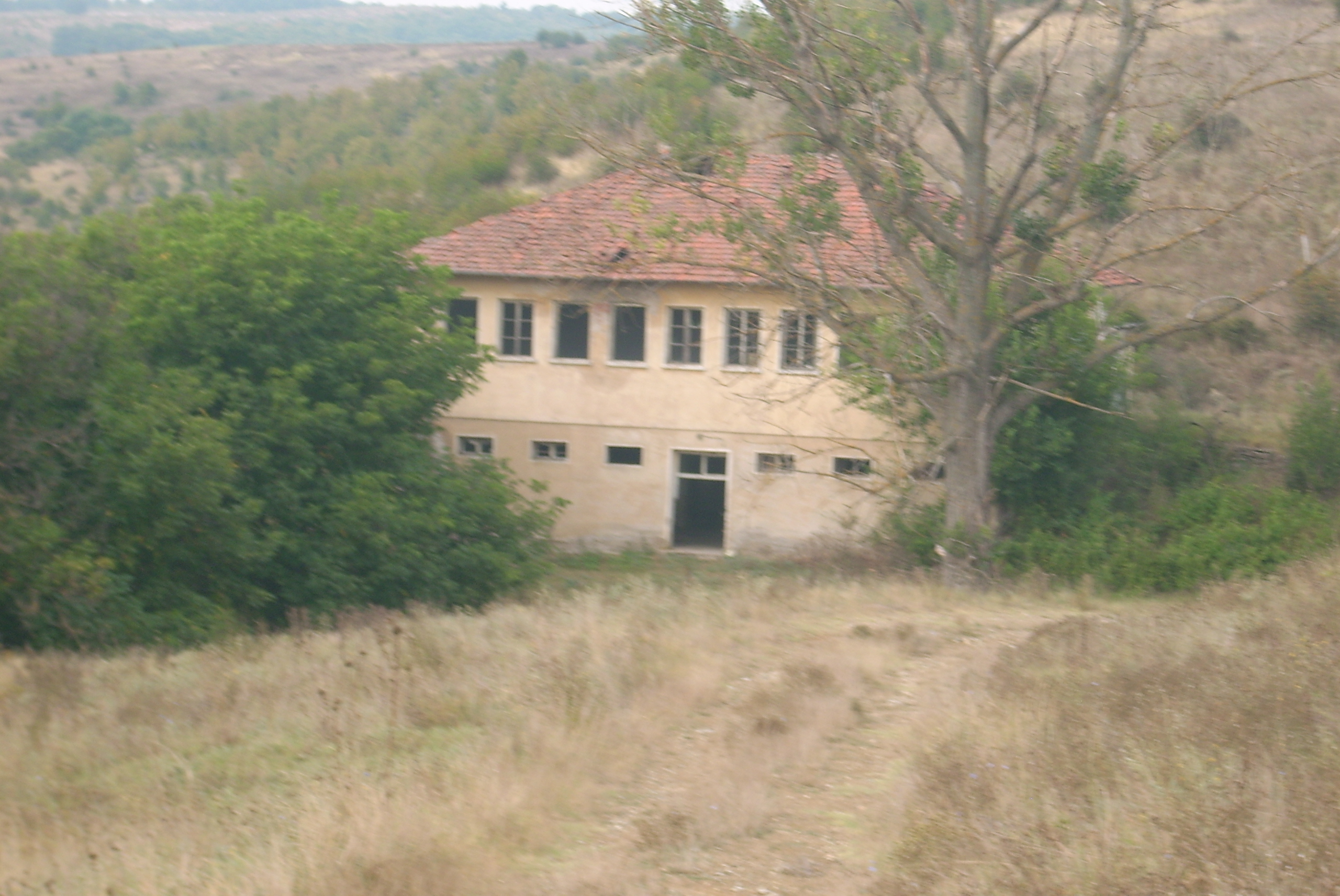 с.Бистрец